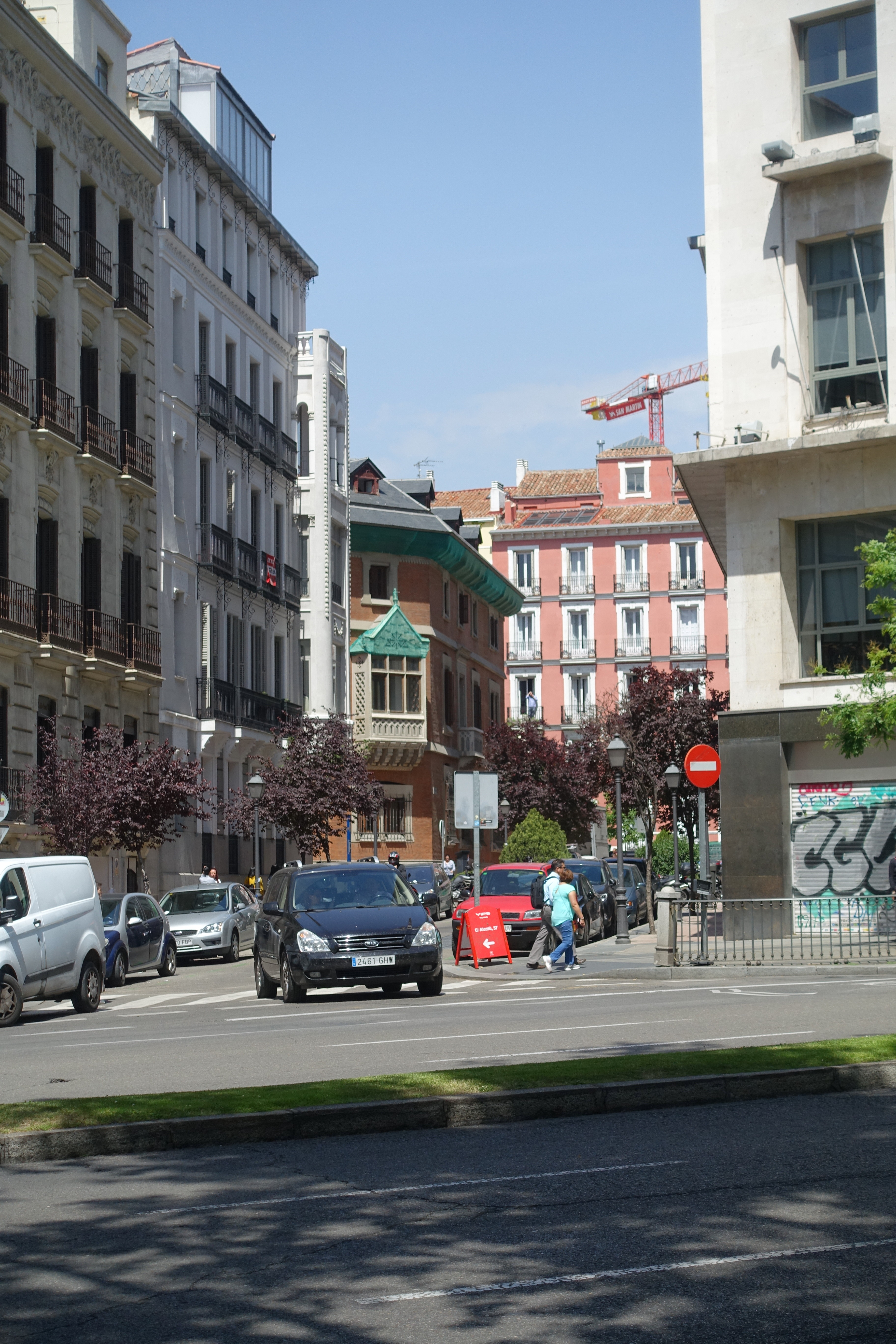 Madrid: Calle Pedro Muňoz Seca